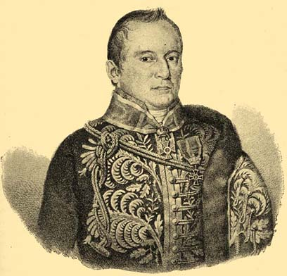 Amade Antal magyar író.